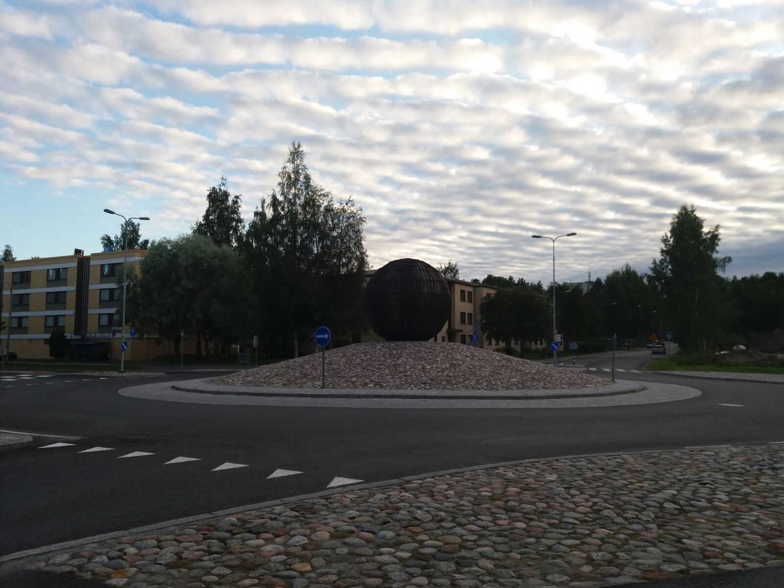 Liikenneympyrä ja koristepallo Ristinummella 2017.